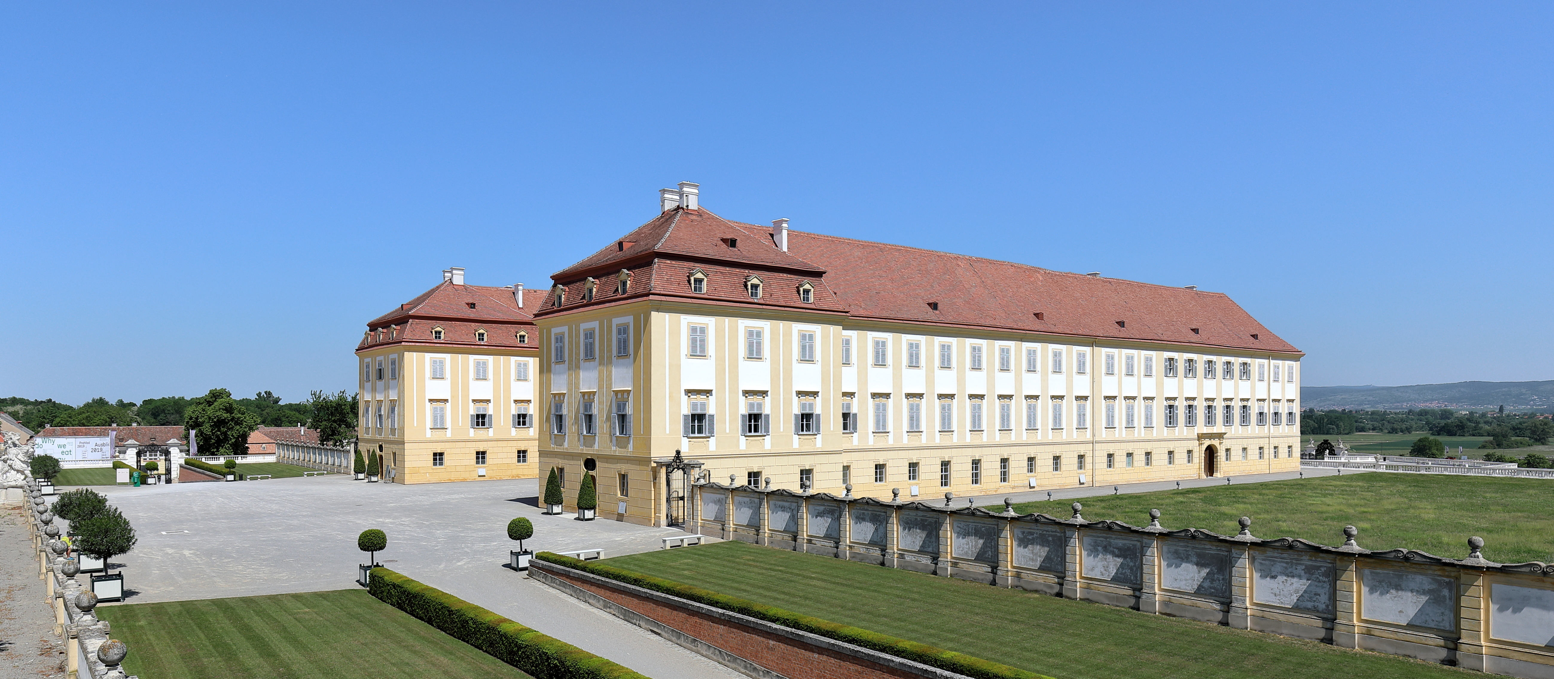 Südwestansicht des Hauptgebäudes der Schlossanlage Schloss Hof in der niederösterreichischen Marktgemeinde Engelhartstetten. Die Schlossanlage wurde um 1627 auf einer Geländekante und östlich der mittelalterlichen Feste Hof errichtet. Nachdem 1725 Prinz Eugen die Anlage erworben hatte, baute er diese zu einem repräsentativen Landsitz aus. 1755 kam das Schloss in den Besitz von Maria Theresia. Von 1773 bis 1775 erfolgte dann ein Um- und Ausbau zum heutigen Erscheinungsbild durch Franz Anton Hillebrandt.